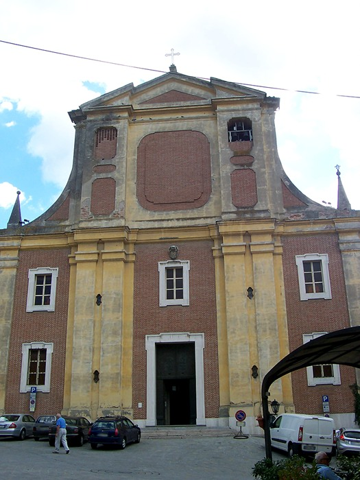 Brisighella - Collegiata di S. Michele